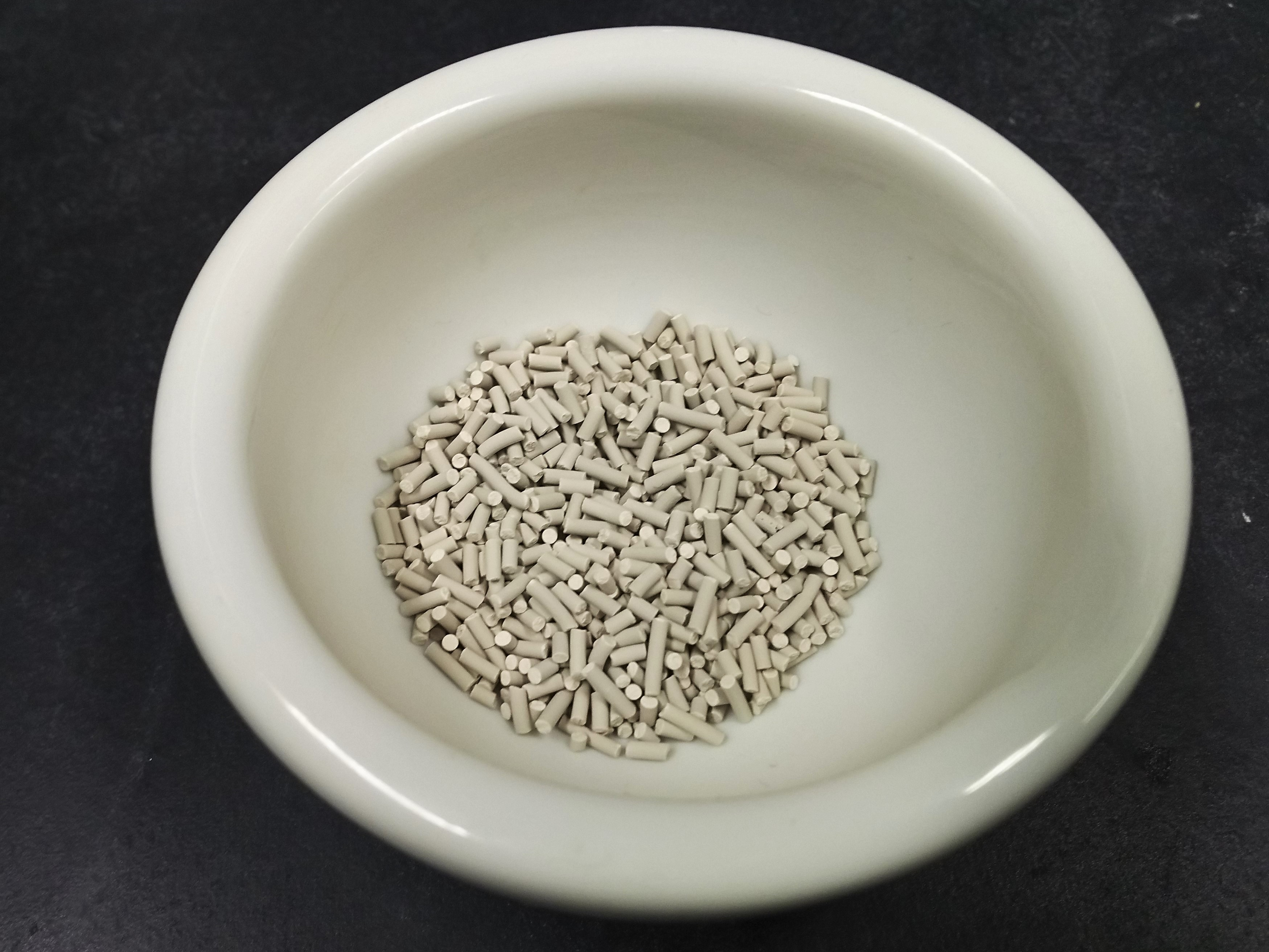 モレキュラーシーブス４A 1/16（和光純薬工業で購入）